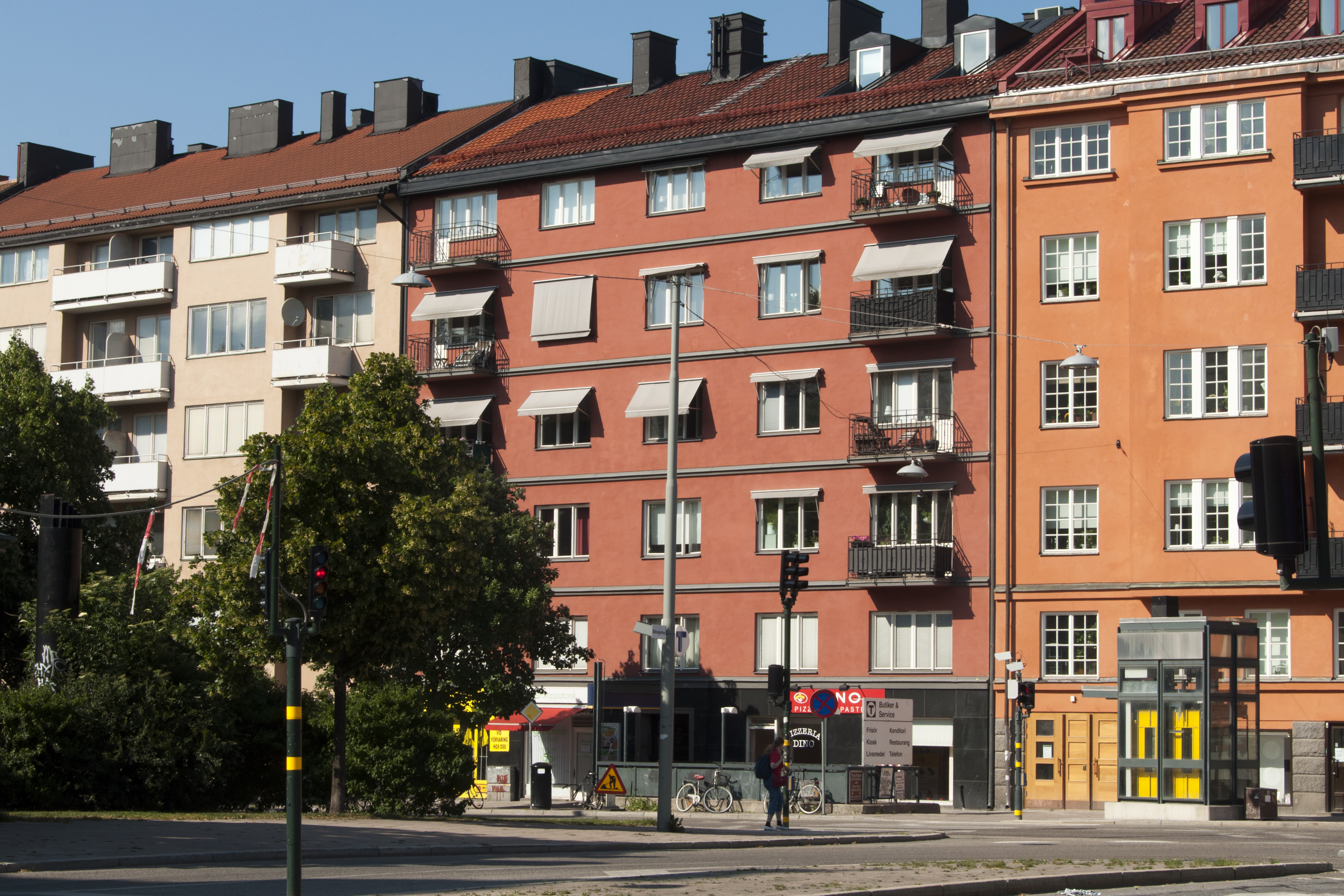 Valhallavägen 53, kv, Roslagsbanan 4, Byggnadsår 1930 - 1932. Anton Wallby (Arkitekt) H. Wallgren (Byggherre)